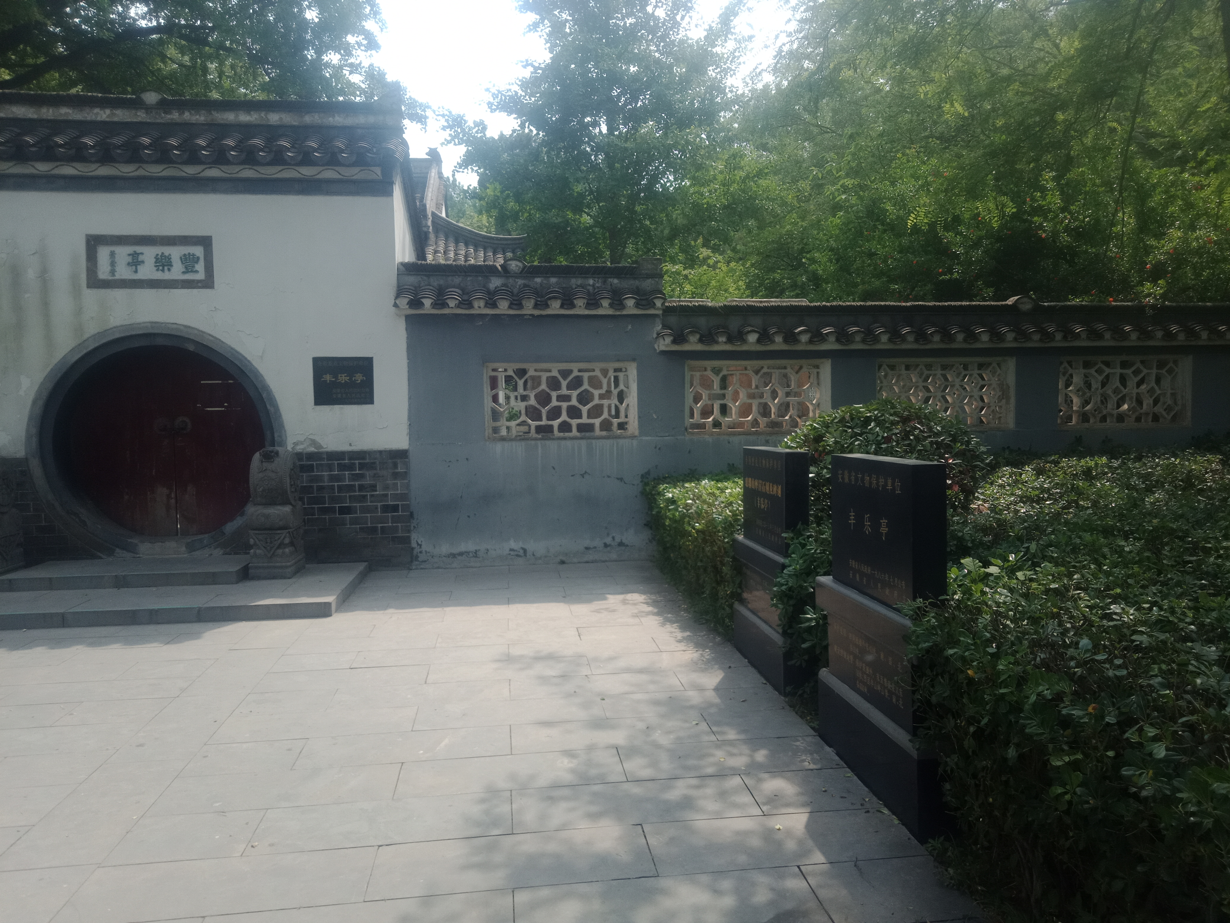 中文（中国大陆）: 我自己亲手拍的丰乐亭